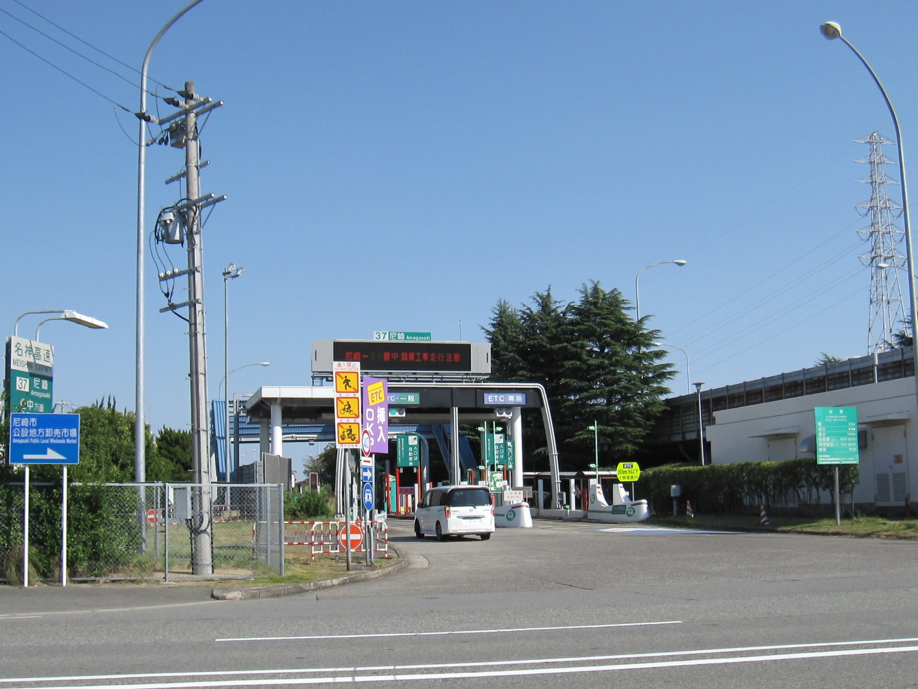 尼崎インターチェンジ上り線側